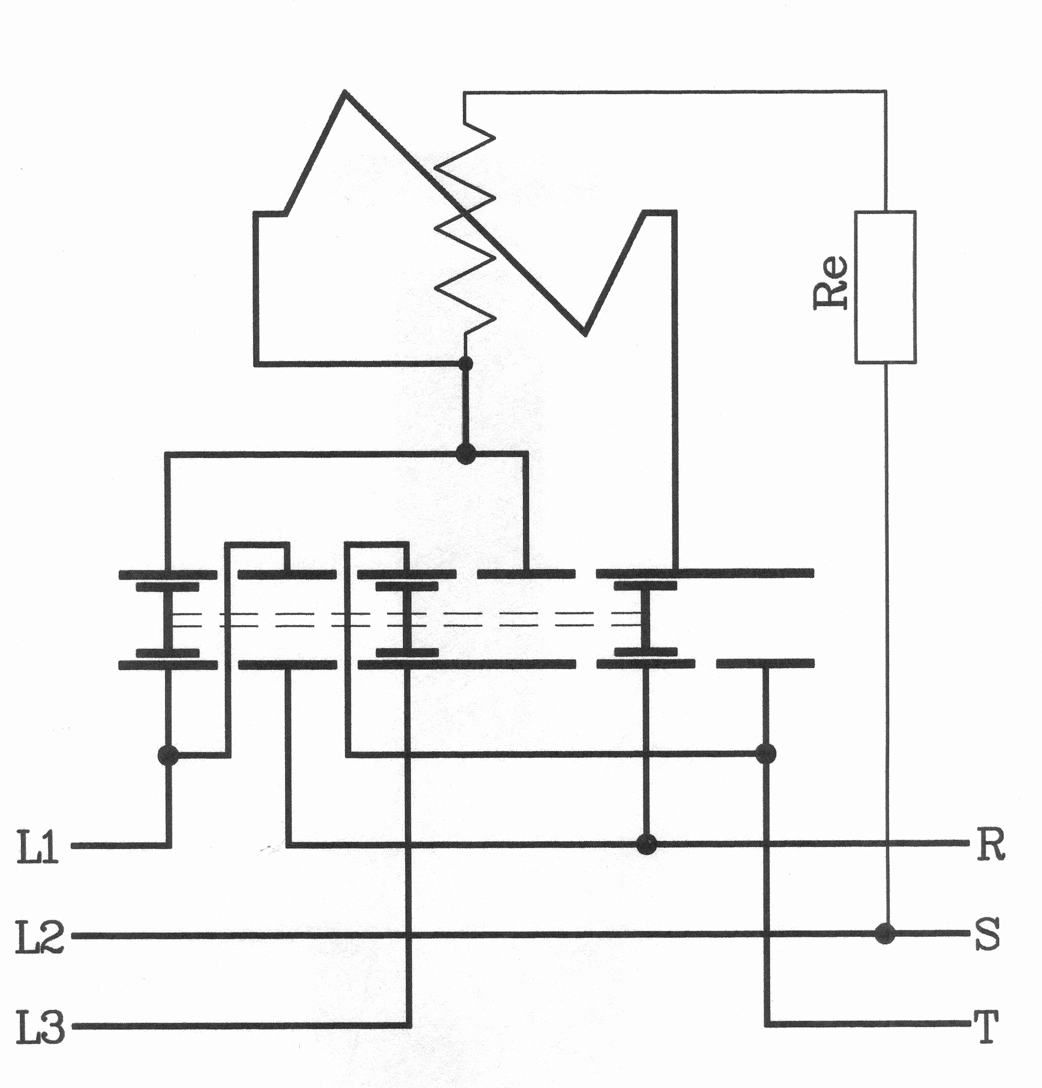 Mérés egyrendszerű, átkapcsolható wattmérővel. Elvi kapcsolási rajz.